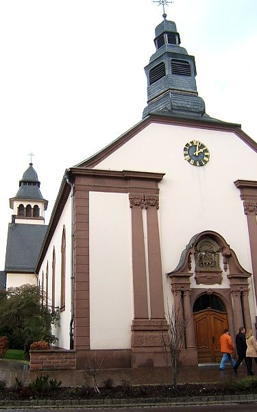 Church in Wasserbillig, Luxembourg